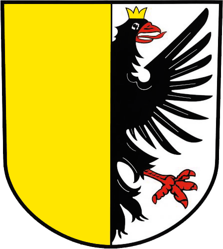 znak města